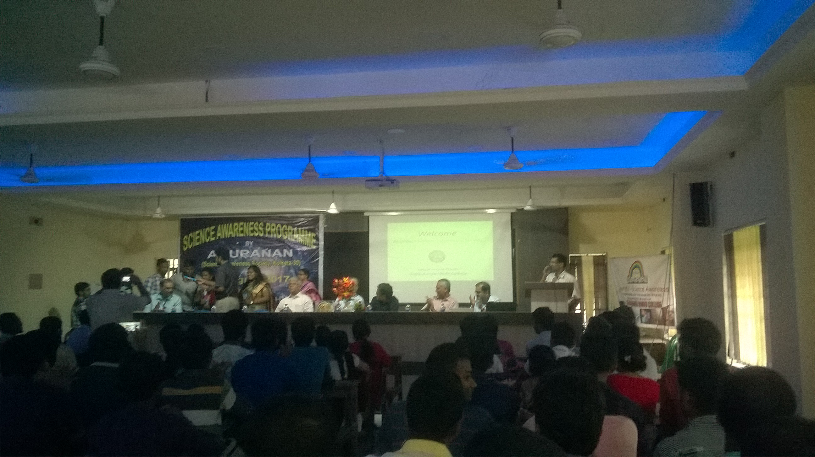 গবরডাঙা হিন্দু কলেজ